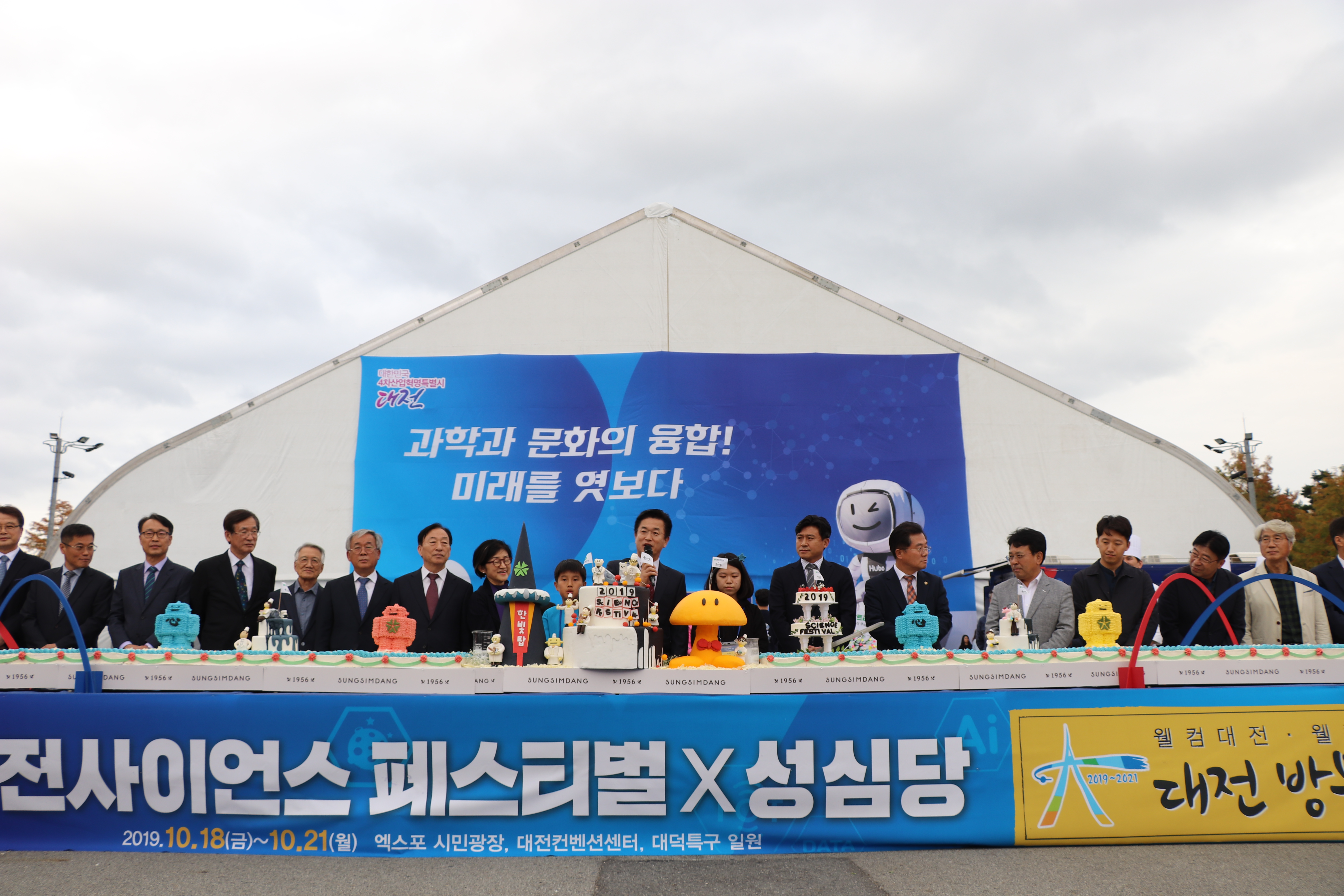 2019 대전사이언스페스티벌 개막식